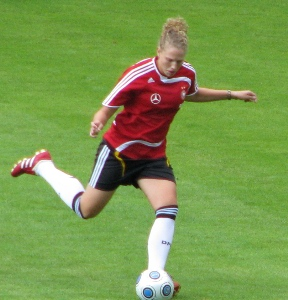 Kim Kulig